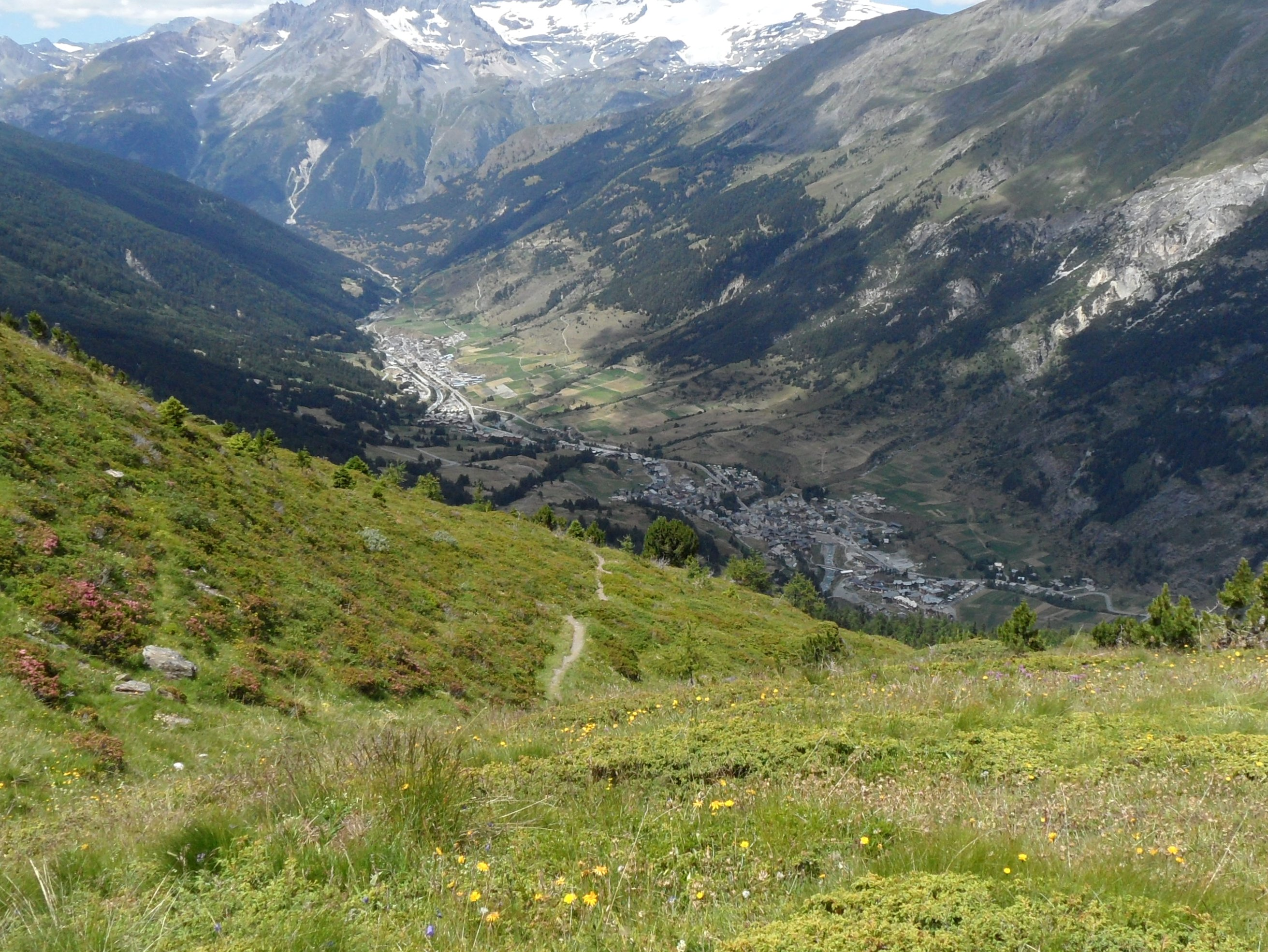 Vue aérienne des villages de Lanslebourg-Mont-Cenis et Lanslevillard.